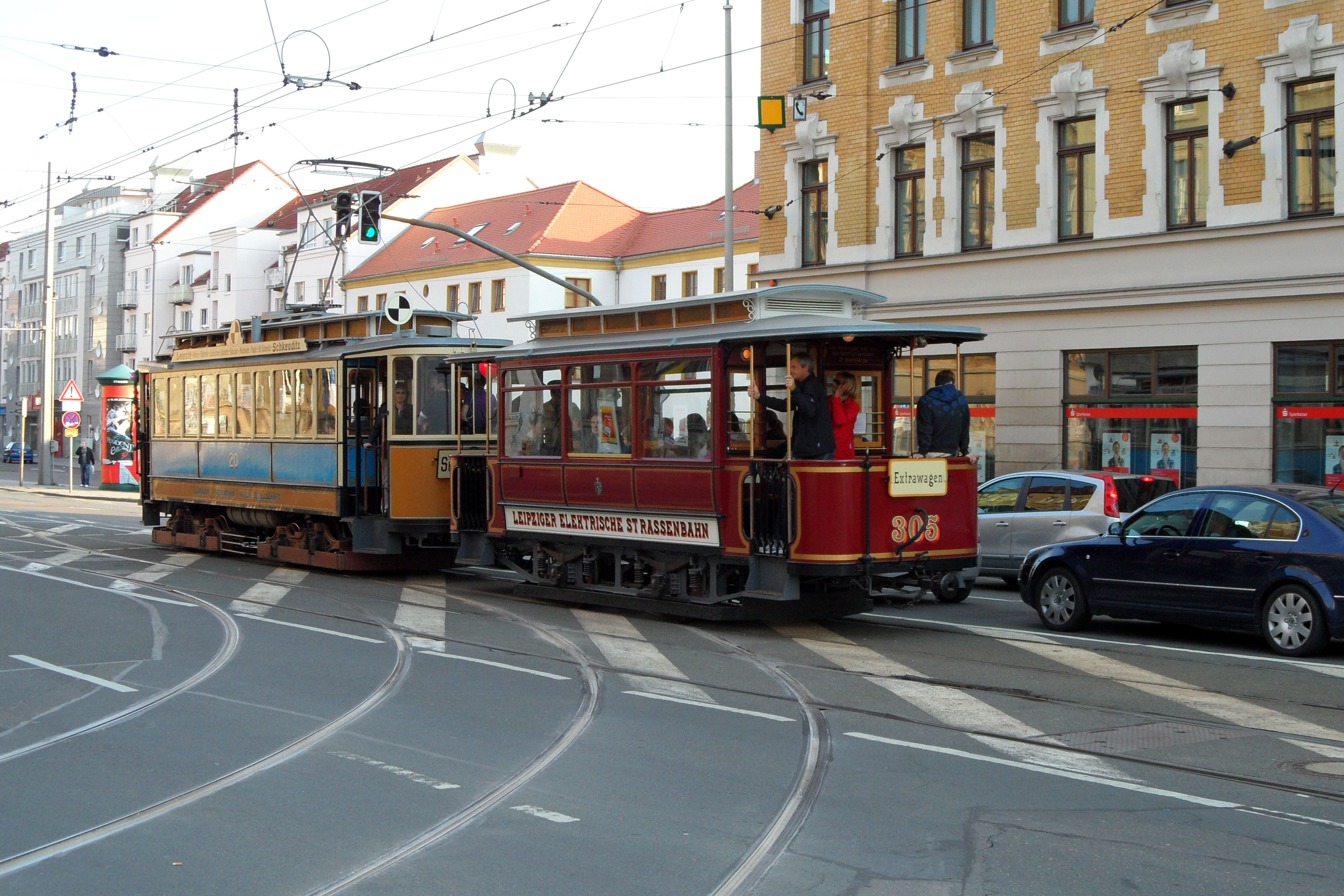 Beiwagen des Typs 55I der Leipziger Elektrischen Straßenbahn, gekuppelt mit dem Maximumtriebwagen 20 der Leipziger Außenbahn vor dem Straßenbahnmuseum. Derartige Zugbildungen waren erst nach der technischen Anpassung der Fahrzeuge nach der Vereinigung von GLSt und LESt 1917 möglich